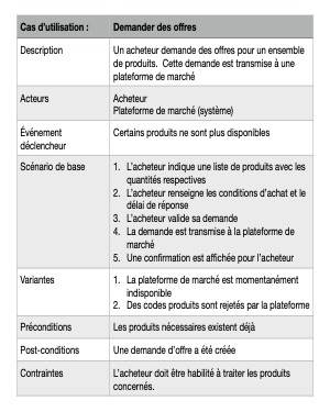 Exemple de descriptif de cas d'utilisation